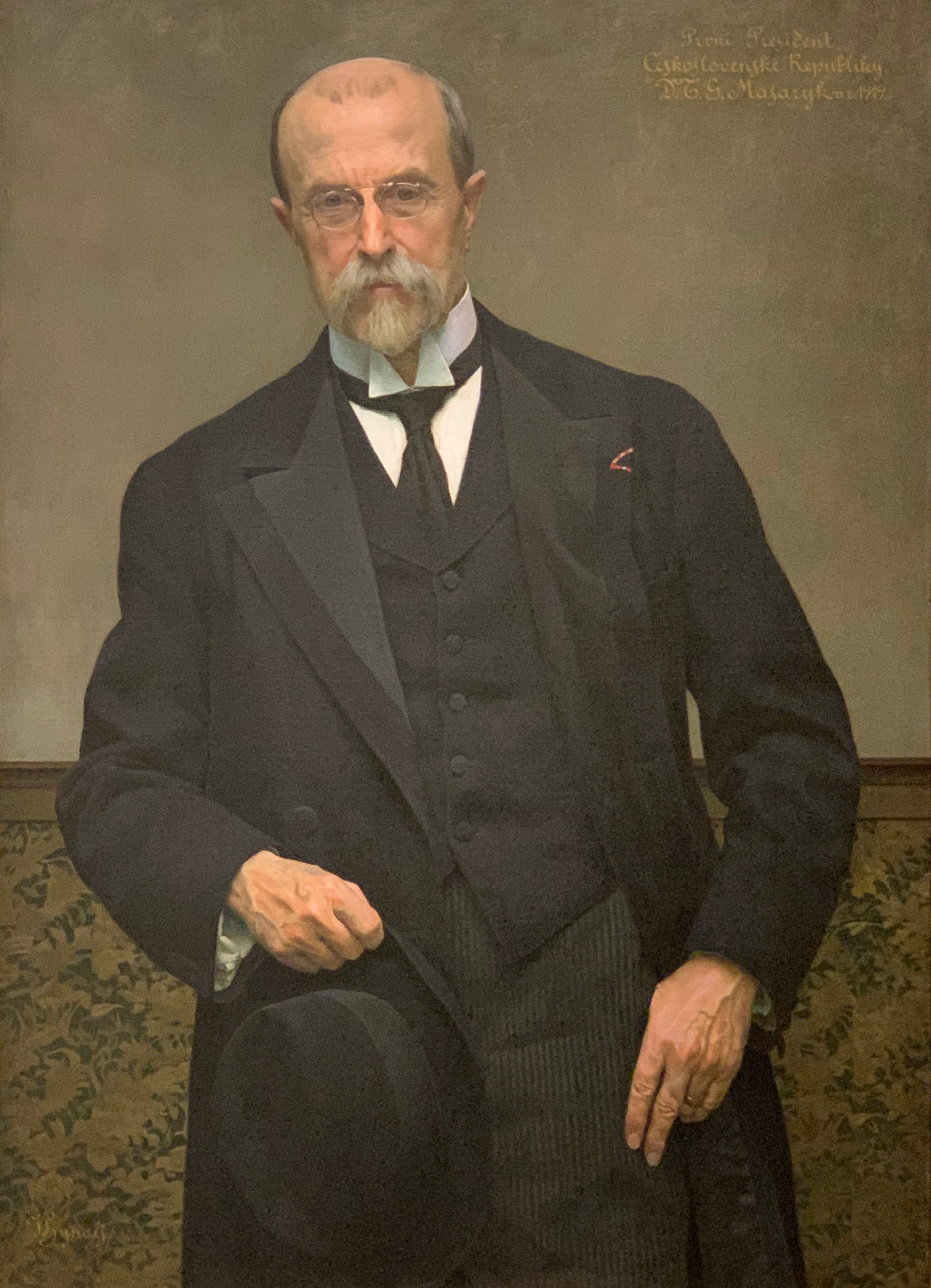 Portrait de Mazaryk (1919) par Vojtěch Hinais (Veletržní palác, Prague).